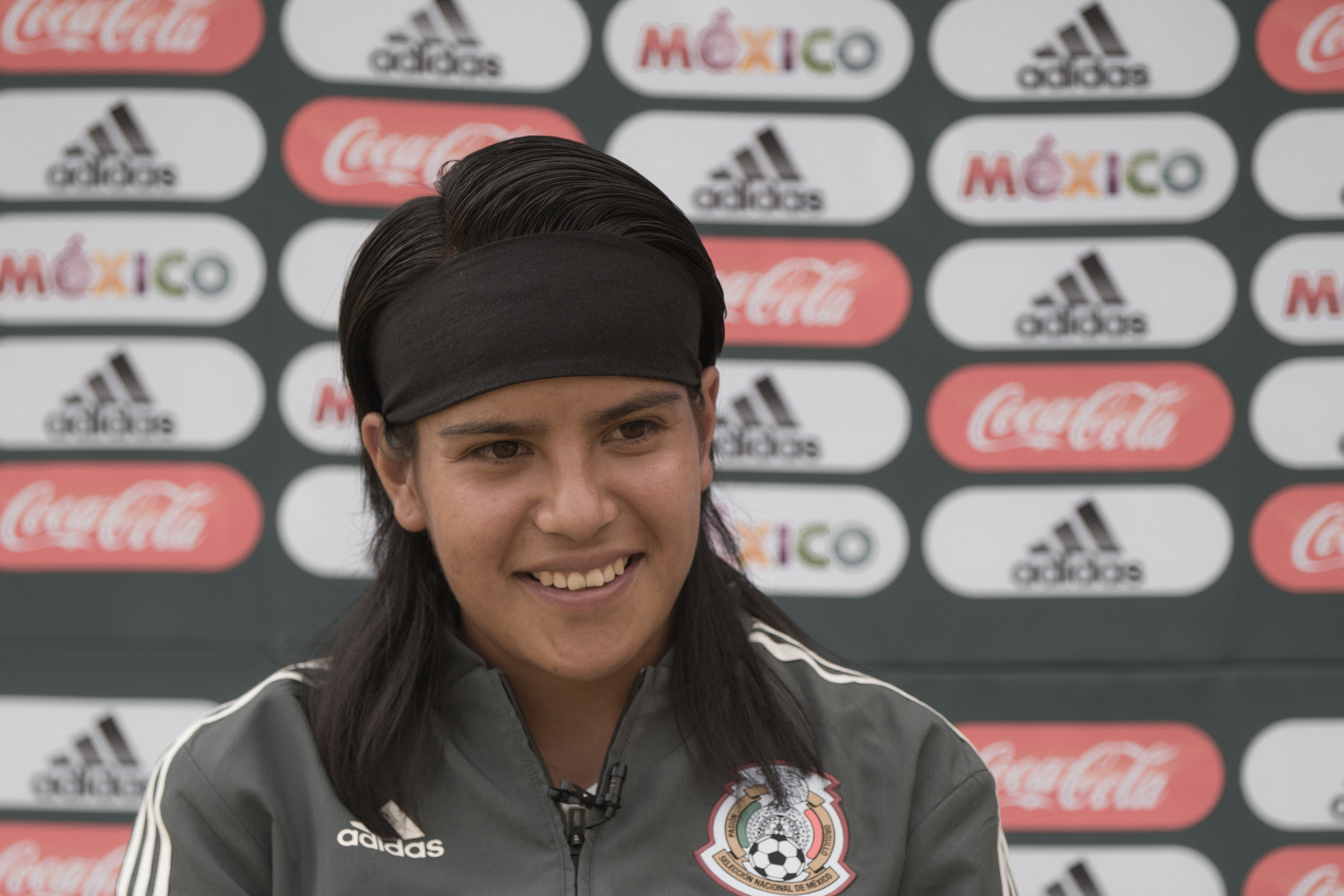 Selección Femenil de Futbol de México.